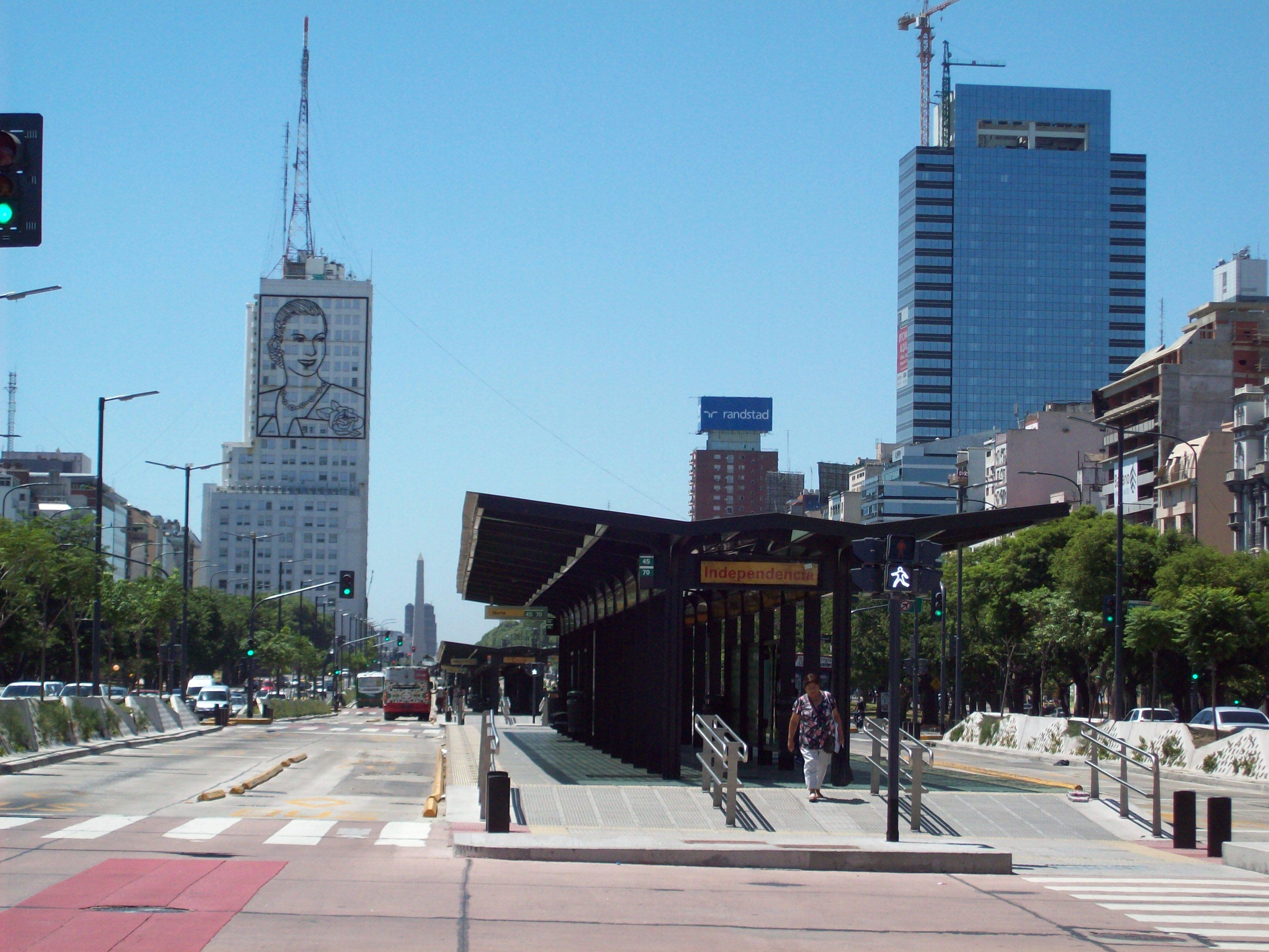 Metrobus de Buenos Aires con el Obelisco y Ministerio de Obras Públicas.